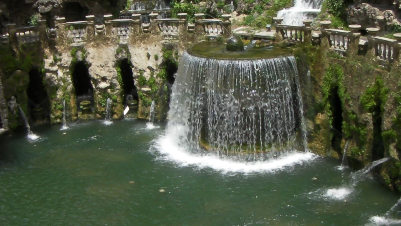 La fontana dell'Ovato est l'un des premiers "théâtres d'eau" du monde, c'est à dire un lieu conçu pour des spectacles aquatiques, Le grand bassin ovale, dominé par la statue de la Sybille, est délimité par une exèdre à arcades et à niches. où se dressent des Néreides. C'est le point de départ de distribution de l'eau qui alimente les fontaines du jardin. _______________ En 1550, le cardinal Hippolyte II d'Este décida de se retirer à Tivoli (à 30 Km de Rome) où il se fit construire une villa d'agrément, sur l'emplacement d'un couvent de Bénédictins. La villa est devenue célèbre pour ses jardins et ses fontaines qui constituent un ensemble unique de 3 hectares, aujourd'hui classé au patrimoine mondial de l'UNESCO. Les anciens appartements de la villa sont visitables. Ils sont décorés de peintures murales de style maniériste, réalisées par des élèves de Girolamo Muziano et Federico Zuccari. L'architecte, maître d'oeuvre de l'aménagement de la villa et des jardins est Pirro Ligorio. Son oeuvre est une des plus éclatantes réussites de la Renaissance et un des premiers "jardins des merveilles" qui a été imité dans toute l'Europe dès sa création. Les jardins restaurés par l'Etat italien font partie des sites incontournables du tourisme dans la région de Rome. le site officiel de la villa d'Este l'article Wikipedia